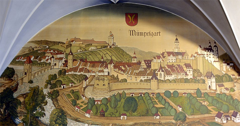 Gemälde der Stadt Mübpelgart (Montbéliard) im Kloster Bebenhausen